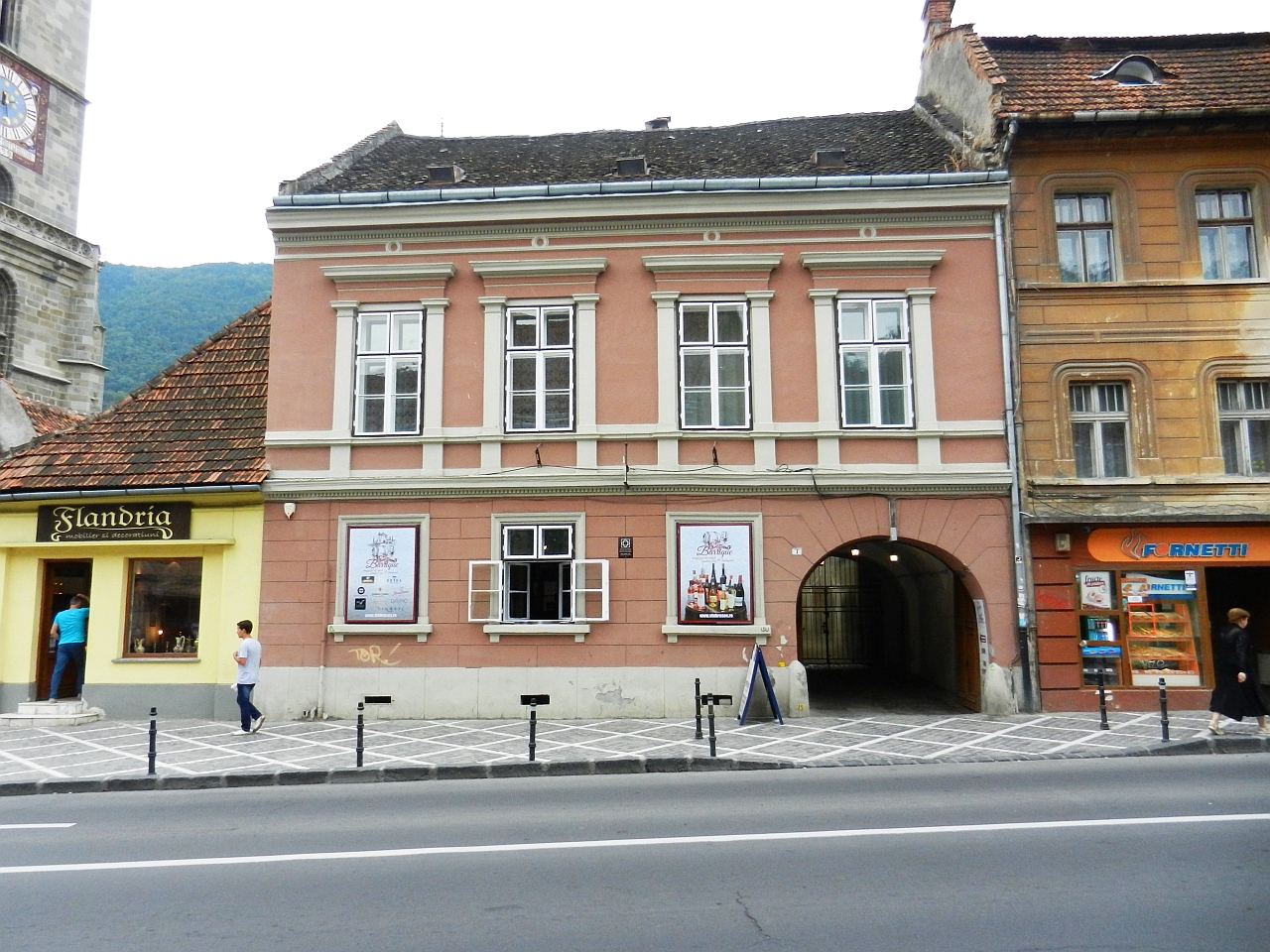 Casă monument istoric (Baritiu 7)